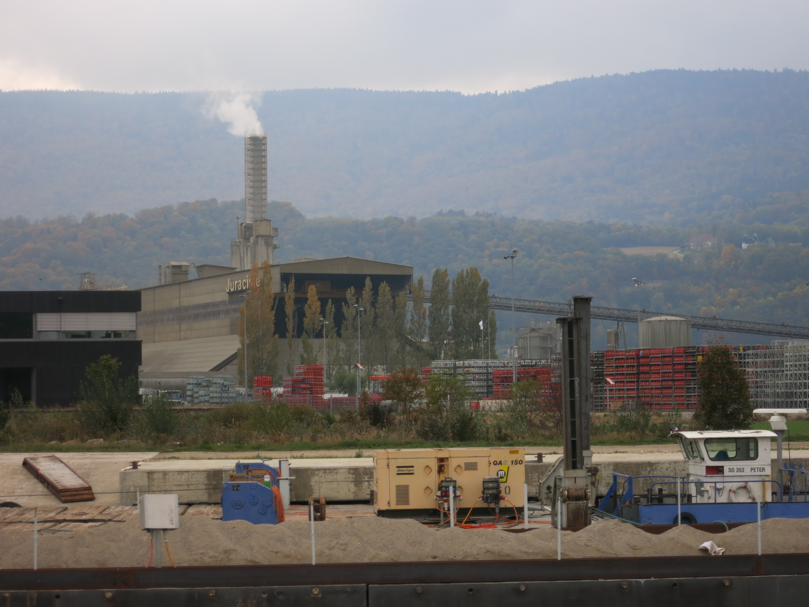 Zihlkanal NE/BE, Schweiz